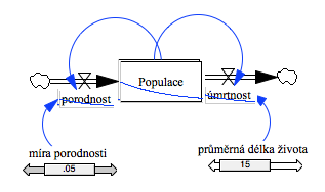 životní cyklus SFD, provedená simulace Vensim